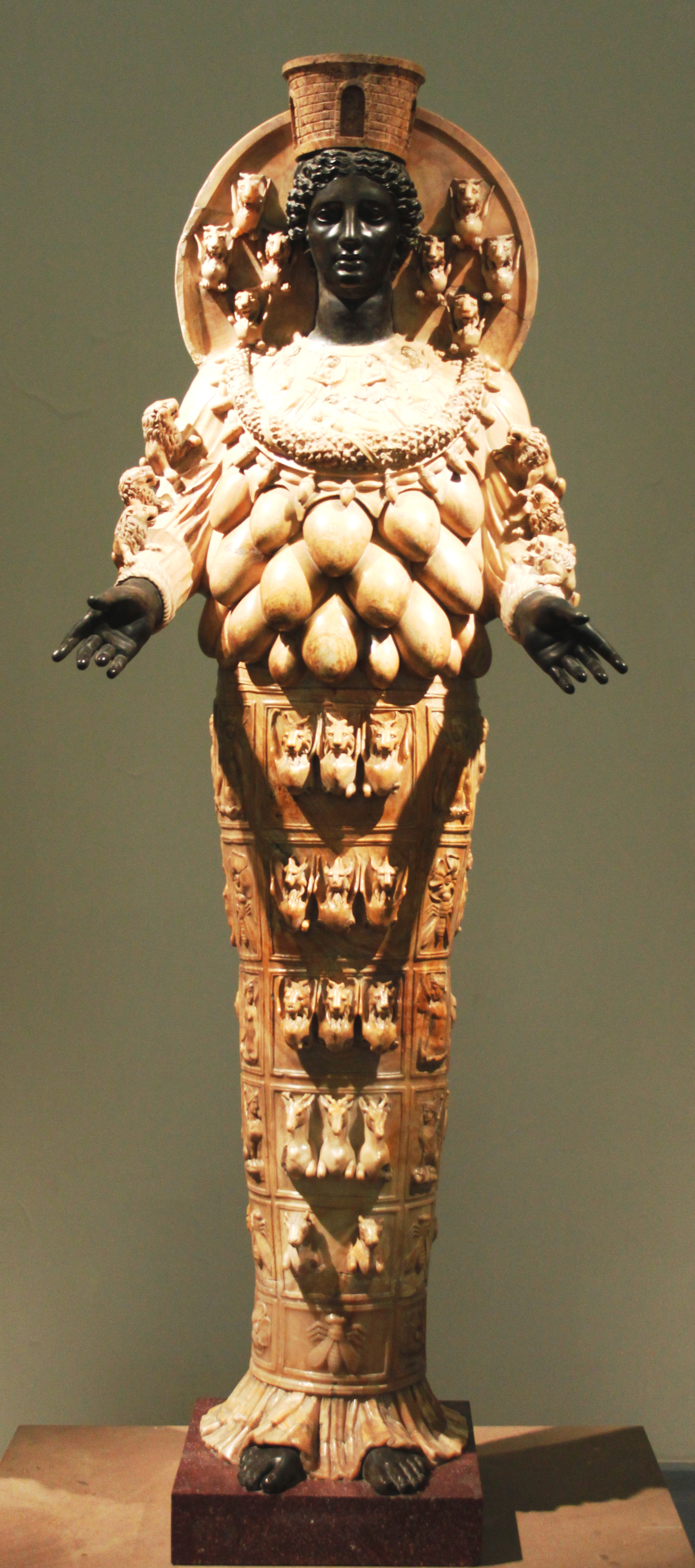 Artemide Efesia risalente al II secolo d.C. La statua rappresenta l'immagine cultuale presente nel tempio di Artemide a Efeso. Originariamente l'immagine cultuale era in ebano, ricoperta di vesti preziose e gioielli periodicamente rinnovati per mezzo di elaborate cerimonie. Qui l'immagine veste un chitone (χιτών) stretto sotto un grembiule (ἐπενδύτης) legato da una cintura. Sul busto propendono un insieme di "mammelle", che in realtà intendono rappresentare gli scroti di toro offerti alla dea: la castrazione di questi animali a lei sacrificati indica il potere che la dea ha sugli uomini e la garanzia che essa offre sulla loro fertilità. La corona cilindrica (πόλος) e l'aureola sono in alabastro, frutto del restauro di Alberto Albacini; la testa, i piedi e le mani sono in bronzo, opera del restauro di Giuseppe Valadier. È conservata presso il Museo archeologico nazionale di Napoli.